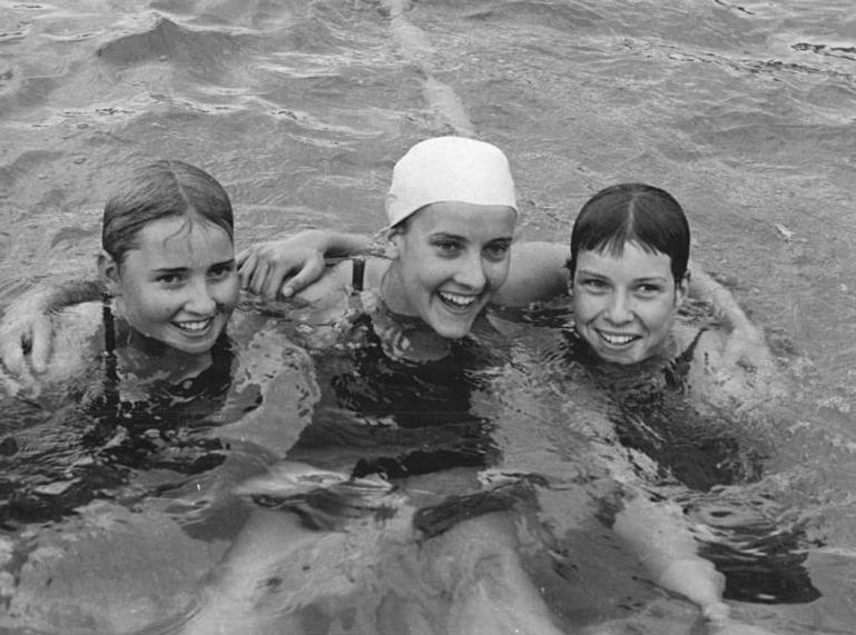 Karin Beyer Zentralbild Schaar Wen-Kt 4.7.1962 Richtfest im Leipziger Schwimmstadion Karin Beyer über 110 Yards neuen Weltrekord In Anwesenheit des Ehrenpräsidenten der Europameisterschaften im Schwimmen, Dr. Johannes Dieckmann, fand am 3.7. das Richtfest der Bauarbeiter für das 55-Xard-Becken in der bereits fertiggestellten Anlage im Schwimmstadion statt. Zu Ehren der Bauarbeiter waren die ersten Wettkämpfer. Beim anschließenden Start einiger Spitzensportler schwammen Karin Beyer über 110 Yards Brust neuen Weltrekord. UBz: Karin Beyer (Mitte) erhält Glückwünsche ihrer Sportfreundinnen.